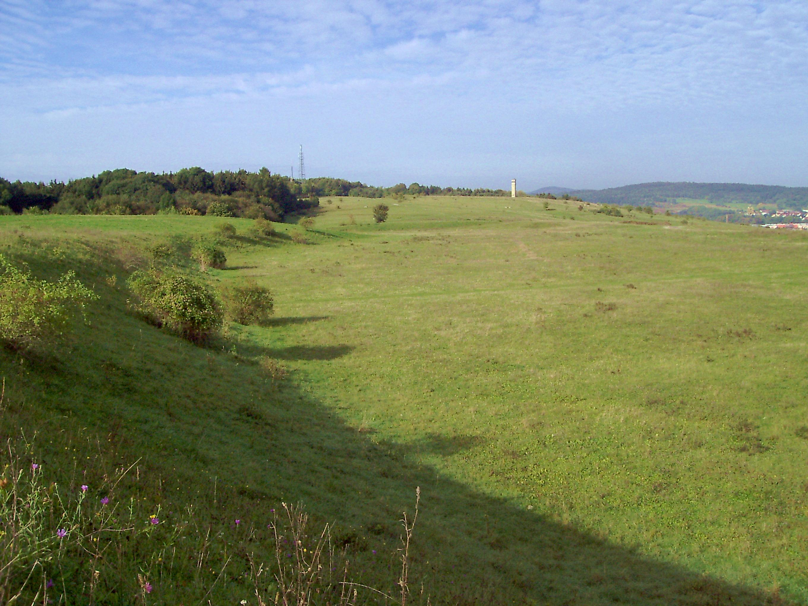 Trespenrasen auf dem Wartenberg (333 m ü. NN) im nördlichen Stadtgebiet von Eisenach. Im Hintergrund ein Beobachtungsturm des ehemaligen Truppenübungsplatzes. Rechts im Hintergrund Eisenach-Stregda mit dem 364 m hohen Moseberg (Moselwald).